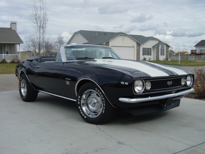 Camaro SS396 Cabriolet de 1967